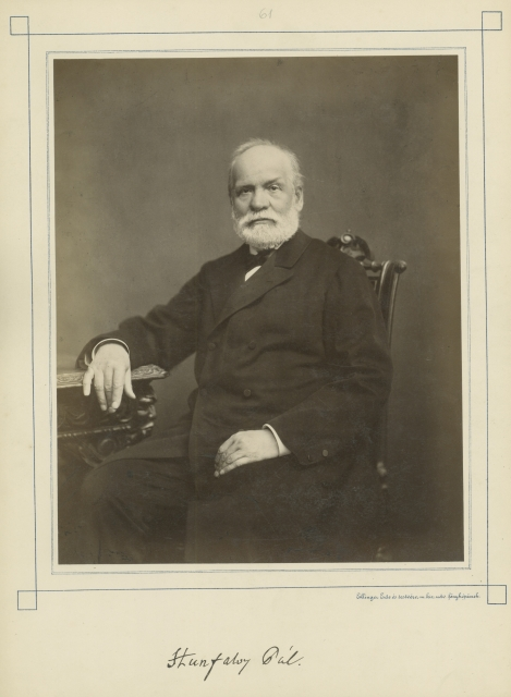 Hunfalvy Pál (1810–1891) nyelvész, etnológus, történetíró, akadémikus portréja és aláírása. Ellinger Ede és testvére felvétele (1880 körül) (A Magyar Tudományos Akadémia könyvtárában)